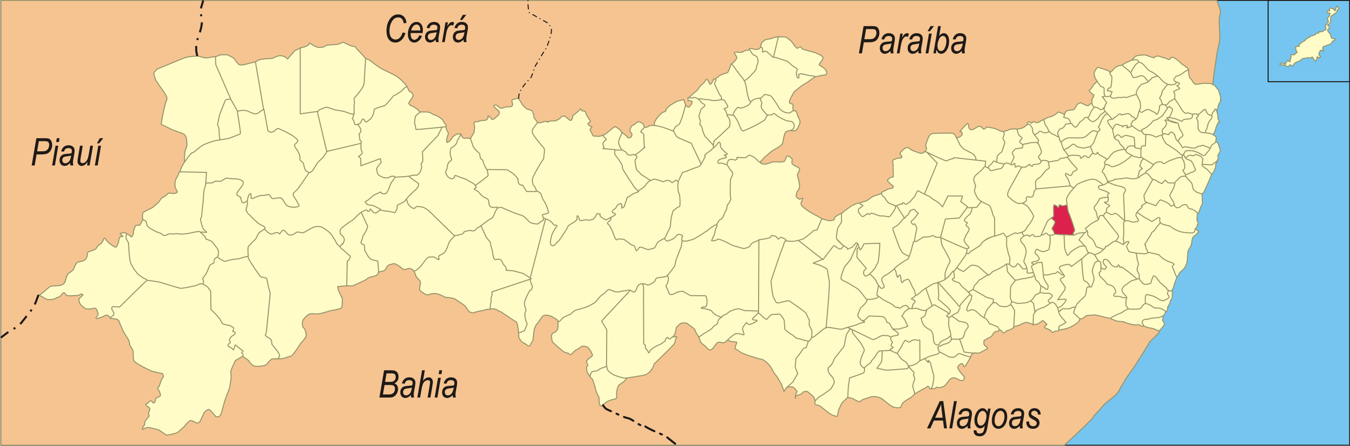 Localização da cidade em Pernambuco